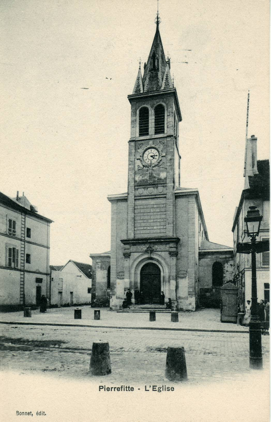 Carte postale ancienne éditée par BonnetPIERREFITTE : L'Église Saint-Gervais-Saint-Protais